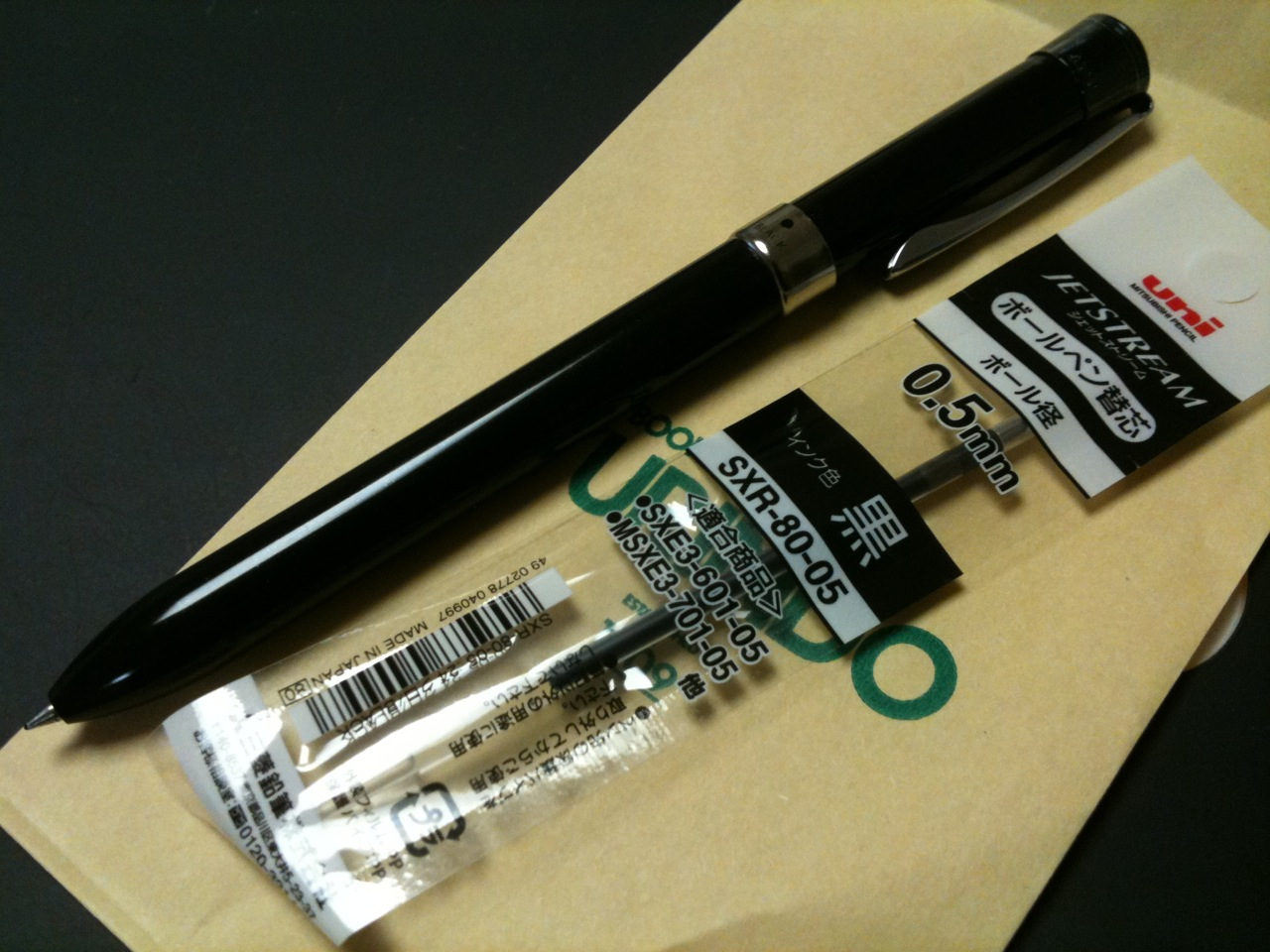 ジェットストリームの三色ボールペンの替芯を買った